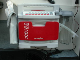 Absaugpumpe von Weinmann